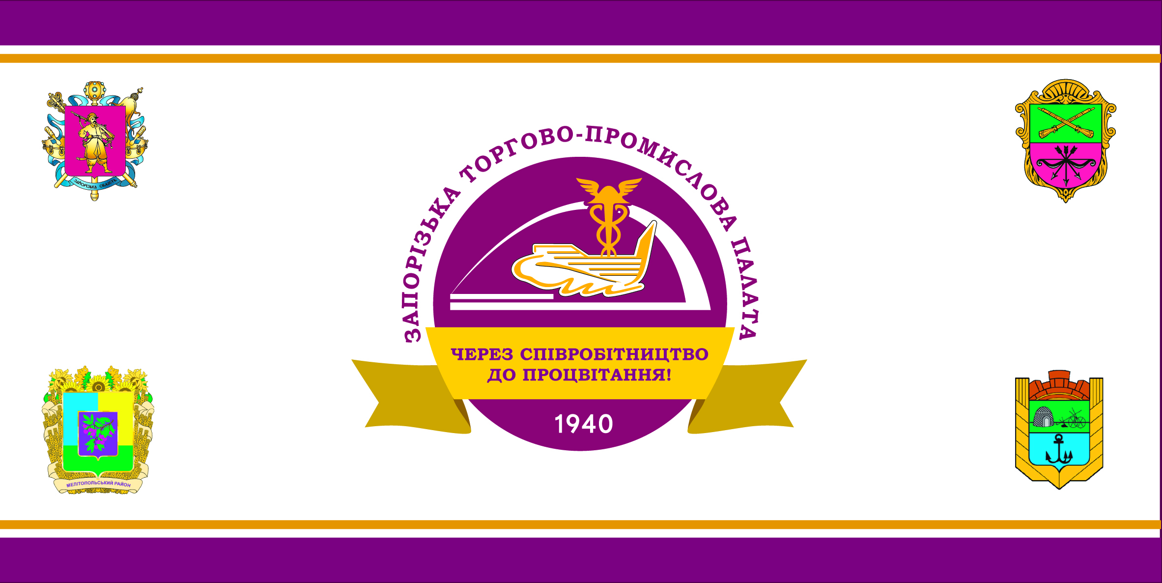 Флаг Запорожской торгово-промышленной палаты